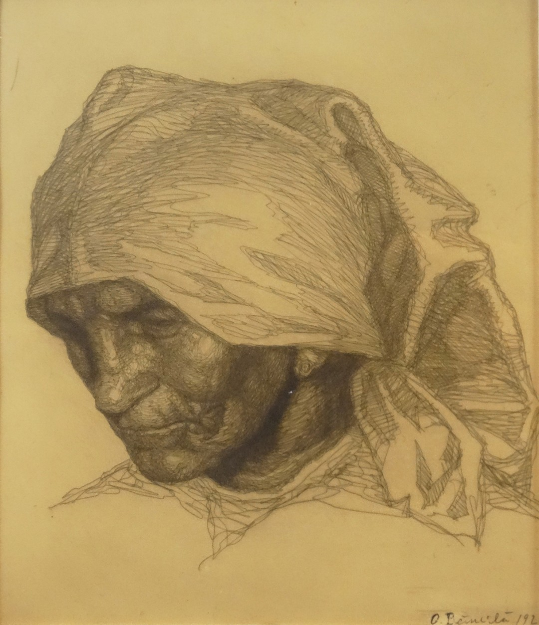 Portret de bătrână, gravura, 36x31cm, semnat dreapta jos, datat 1920